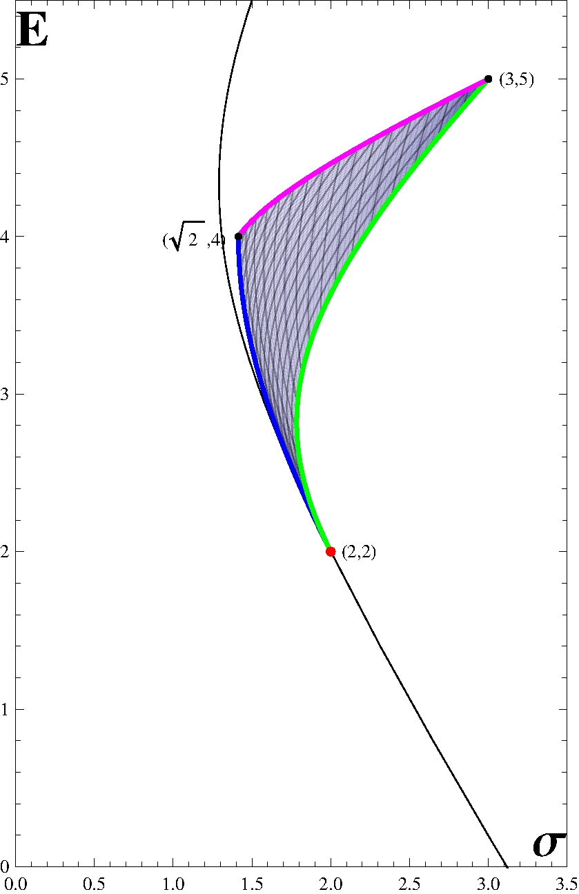 Rysunek do przykładów dla modelu Markowitza